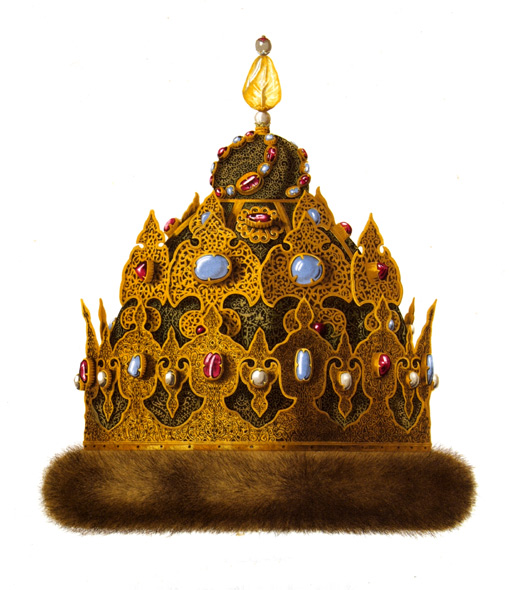 Шапка Казанская. Хромолитография. 1840-е гг. Выполнена по рисунку Ф. Г. Солнцева (1801 – 1892).